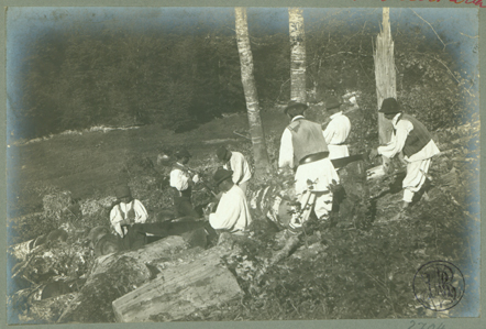 Adler - Tăietori de lemne din Ponor, aprox. 1910